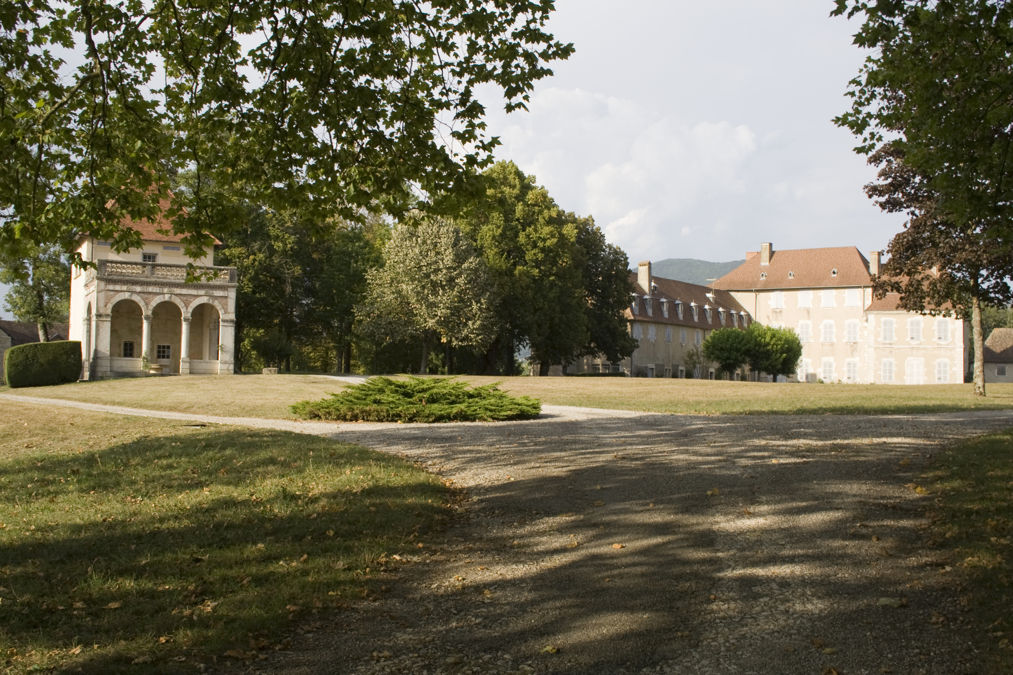 Le Château de Brangues, propriété de Paul Claudel, près de Morestel (Isère)